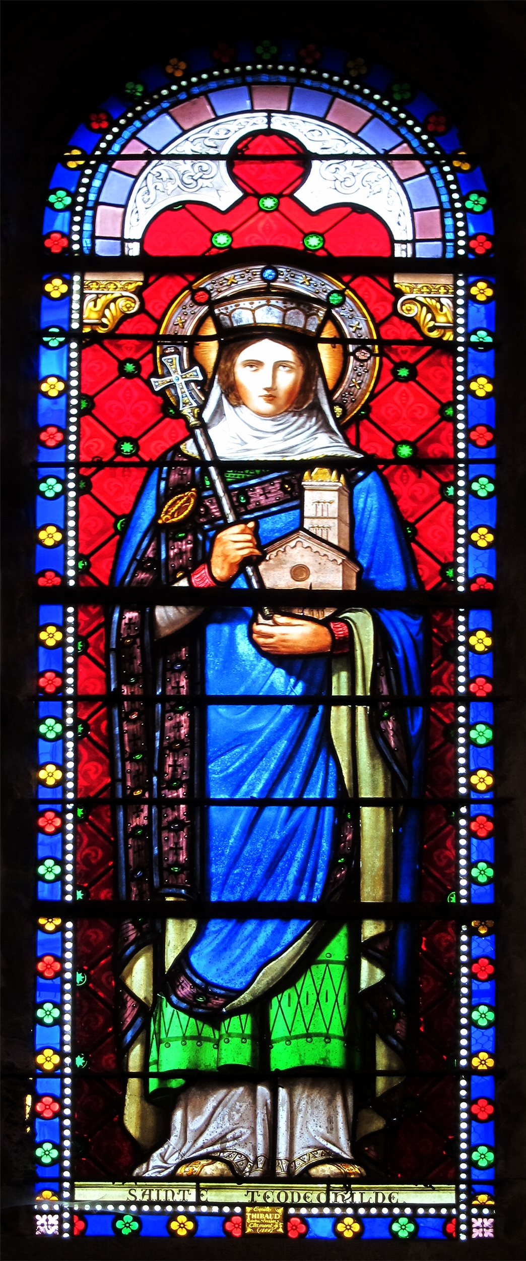 Vitrail de Sainte Téodechilde dans la Basilique Notre-Dame-des-Miracles de Mauriac (Cantal).